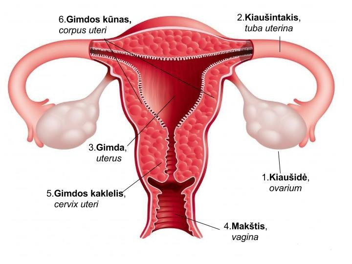 Vaizduojama moters reprodukcinė sistema. Šaltinis